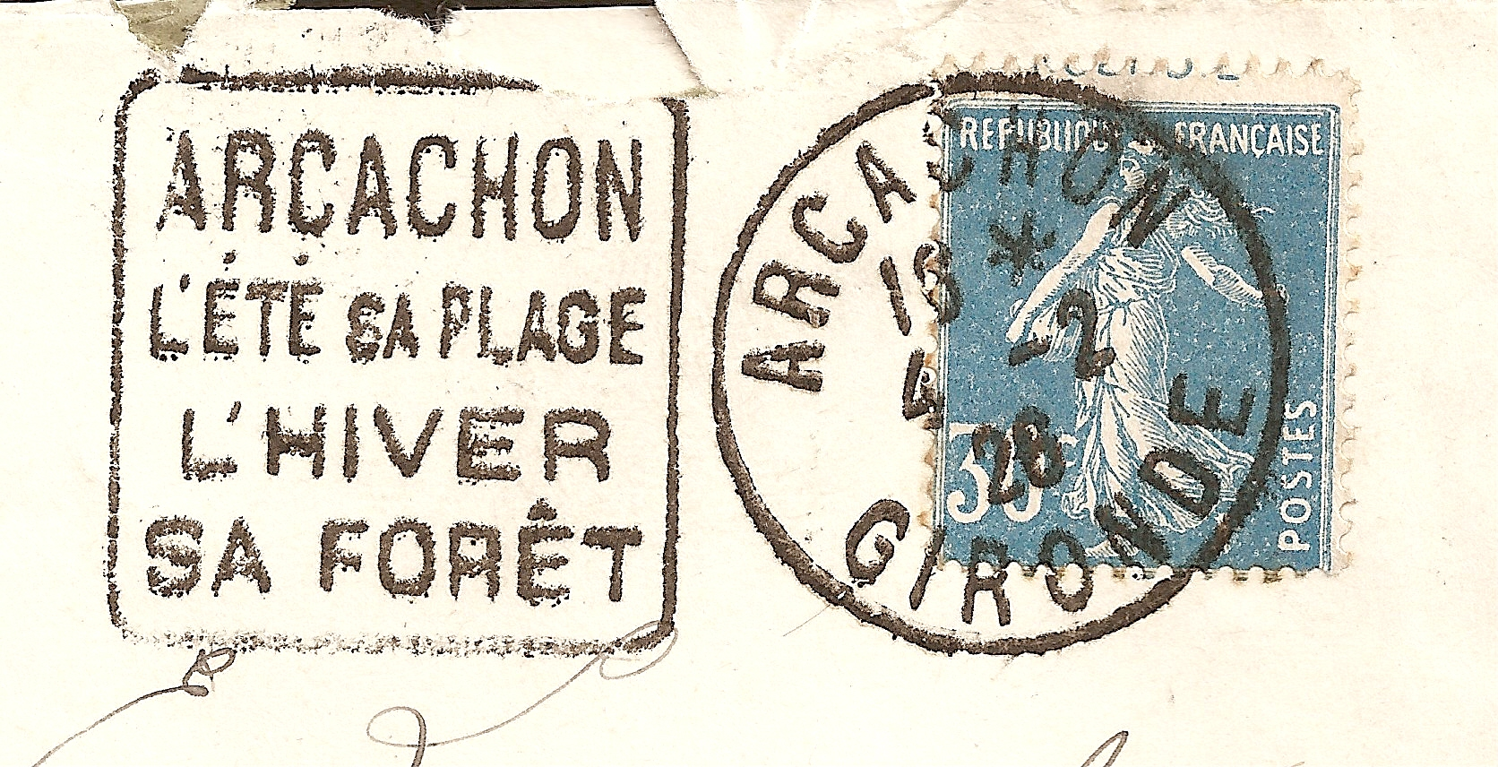 Agrandissement d'un détail de cette enveloppe. Empreinte de la machine Daguin du bureau d'Arcachon en 1926.